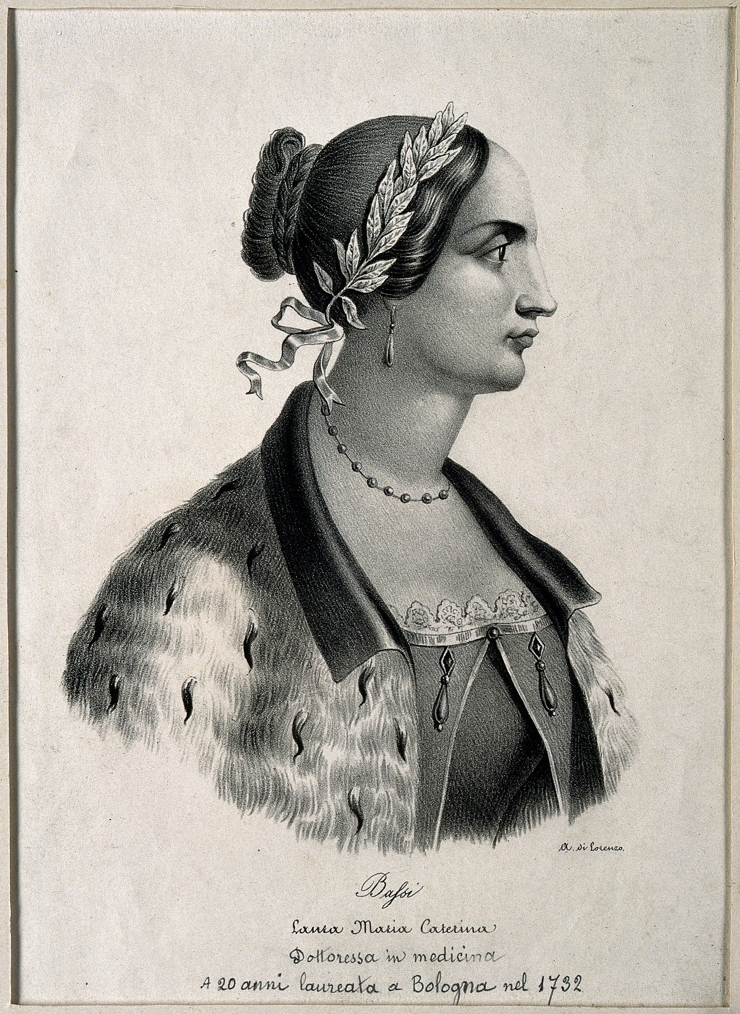 Genre/Technique: Portrait prints. Lithographs. Subject name: Bassi, Laura, 1711-1778.